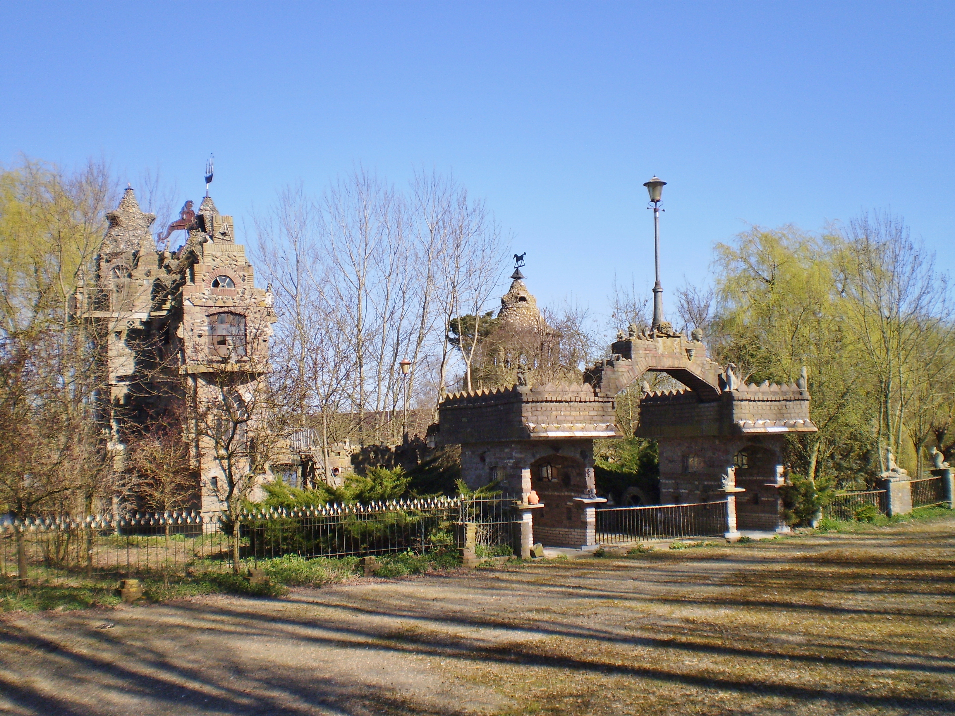 Hammetje